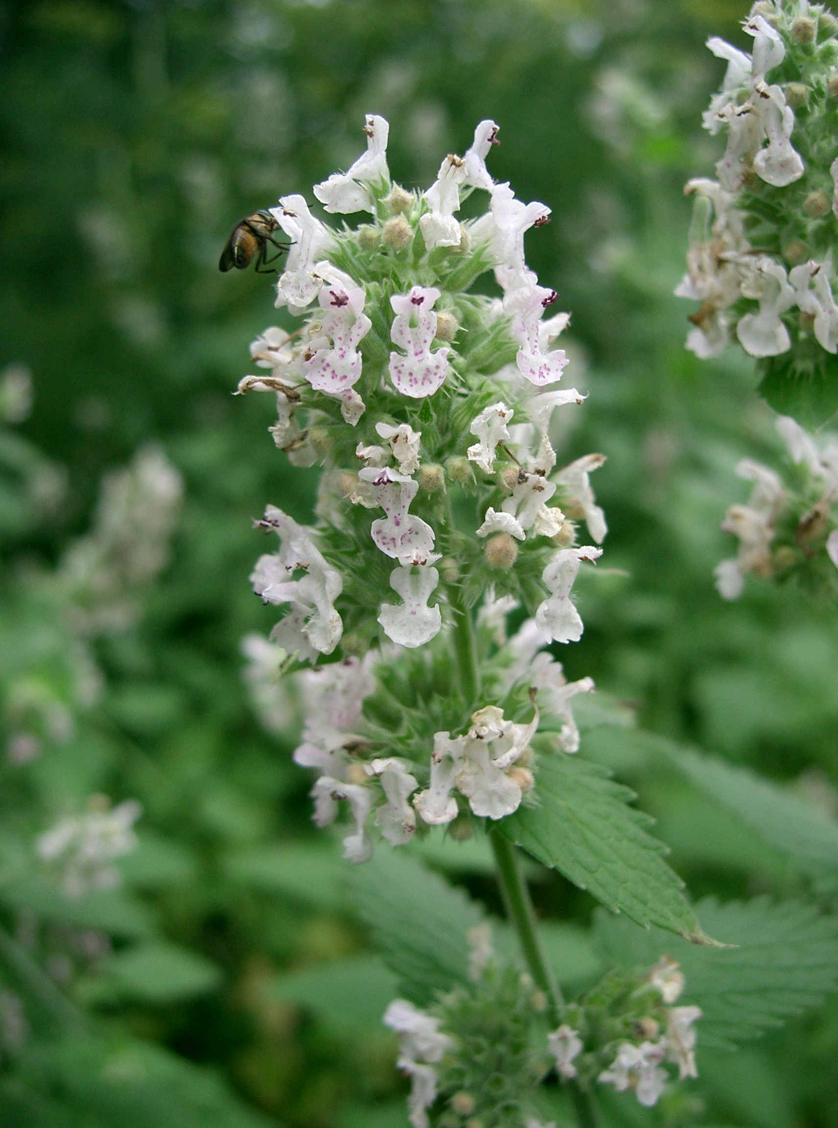 Nepeta catarica